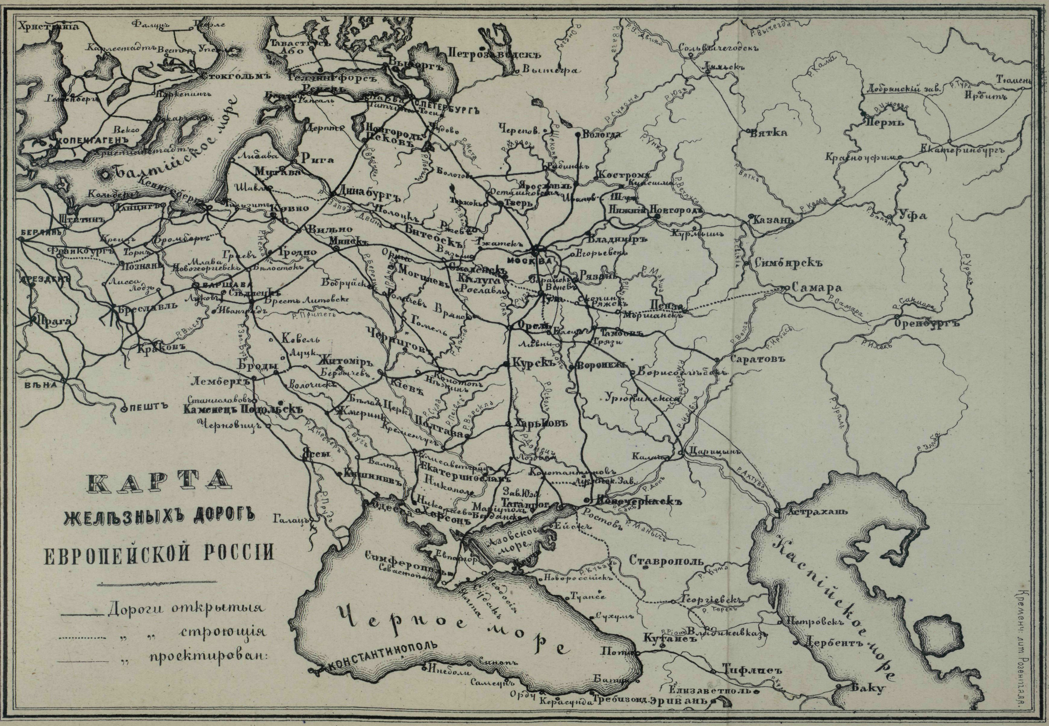 Карта железных дорог европейской части Российской Империи на 1893 год